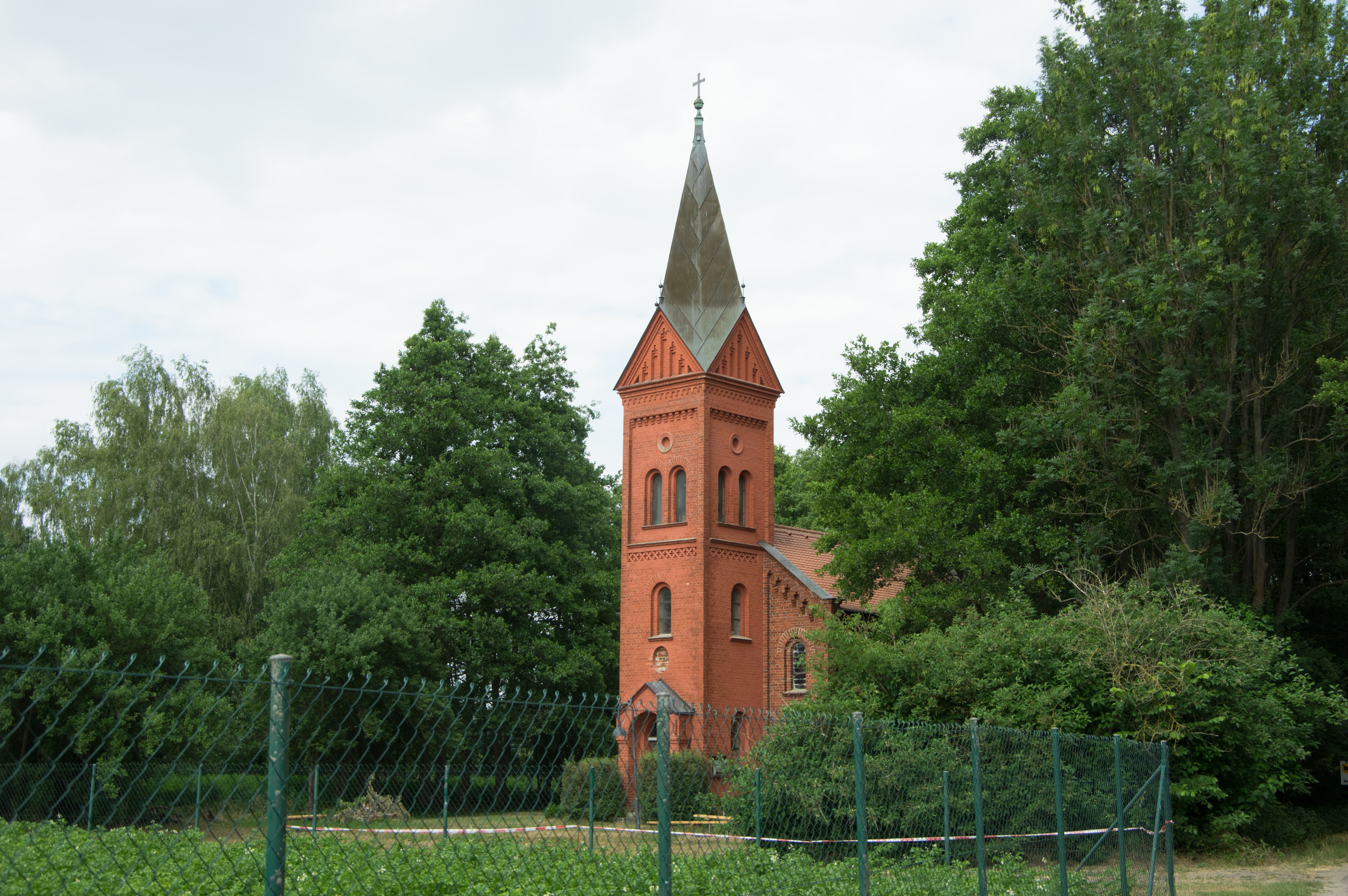 Kloster Lehnin in Brandenburg. Die Kirche steht unter Denkmalschutz.